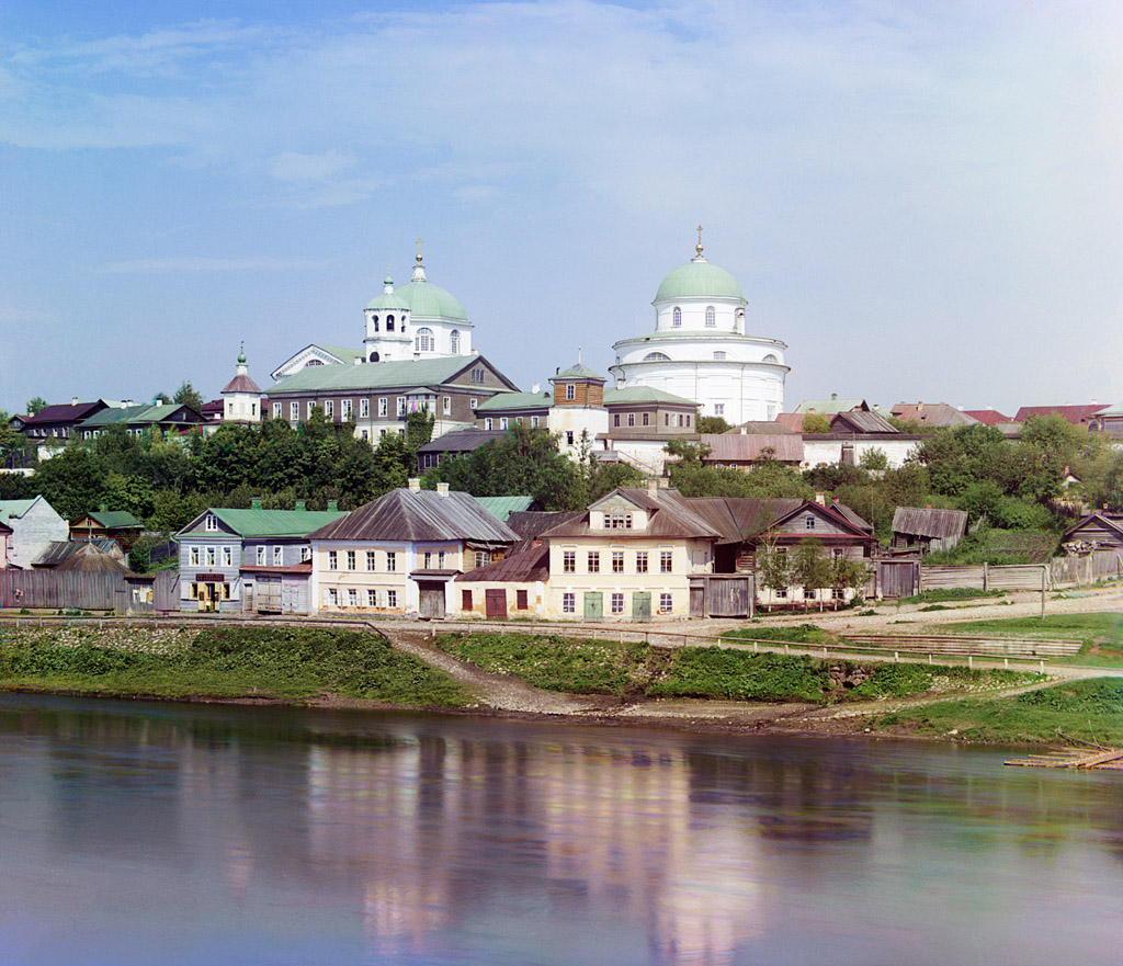 Торжокская набережная, 1910 год. Фотосъёмка Сергея Прокудина-Горского.